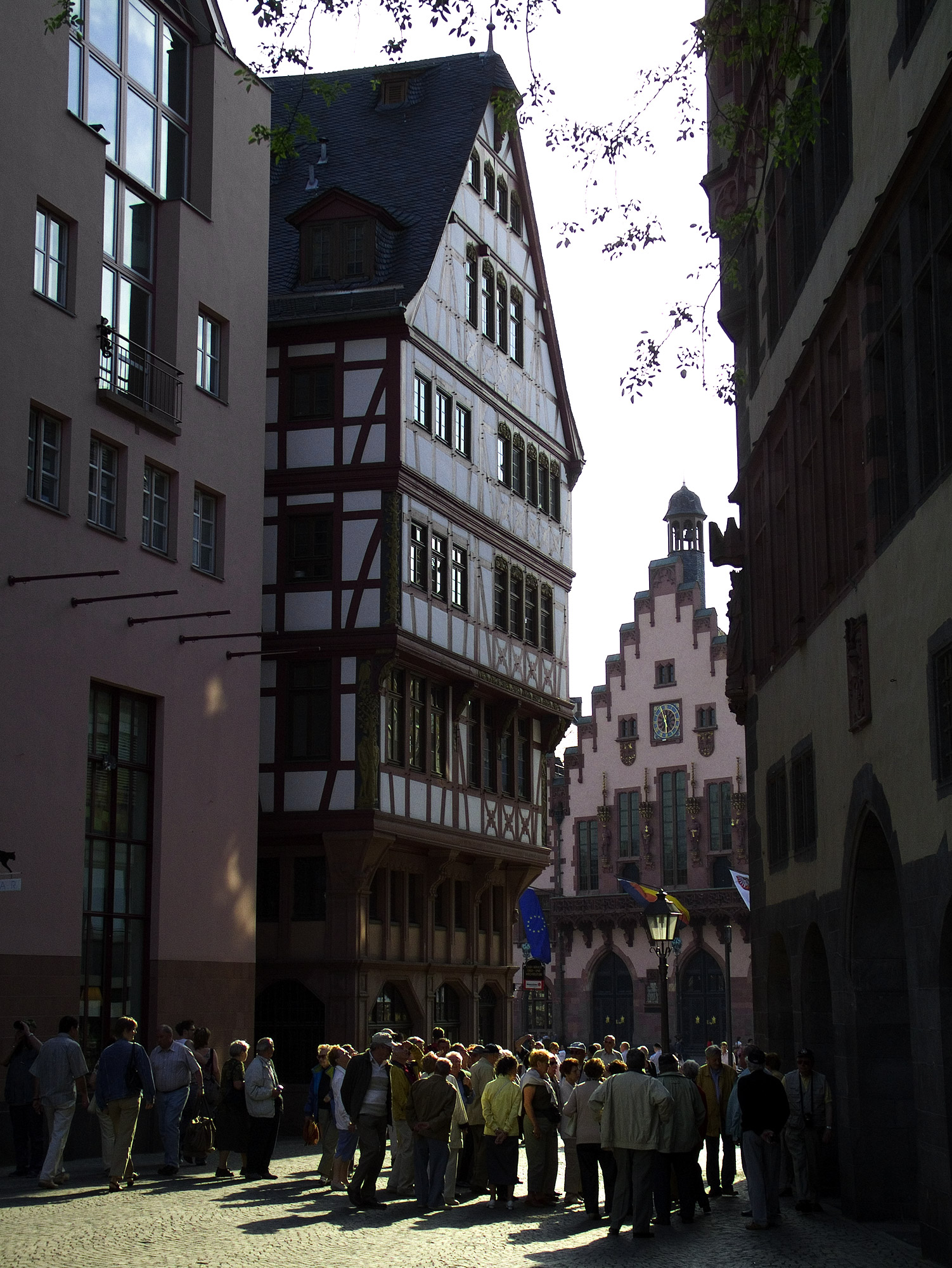 Kleiner Engel in der Altstadt von Frankfurt am Main, von Markt aus gesehen, Gegenwart. Selber fotografiert im Mai 2006, daher gemeinfrei.